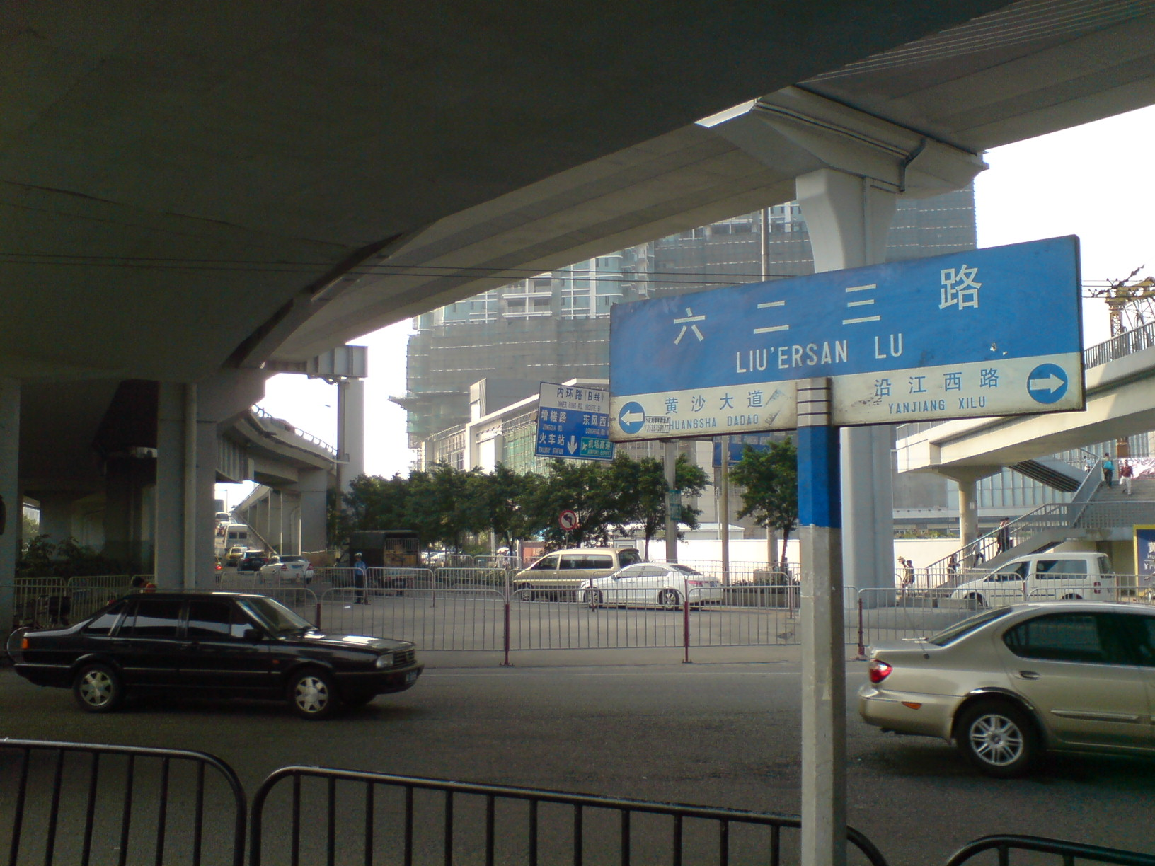 中文（中国大陆）: 广州六二三路